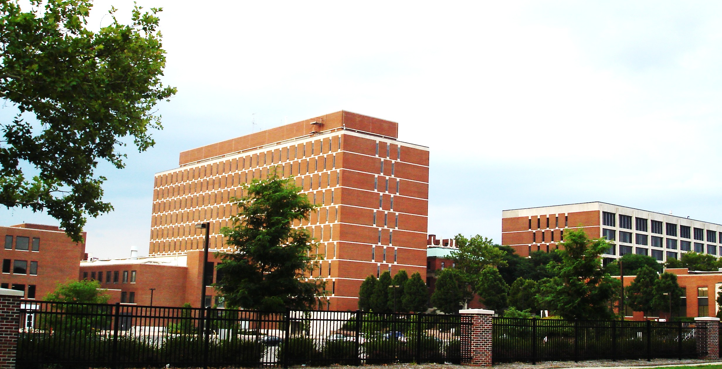 Battelle Memorial Institute in Columbus